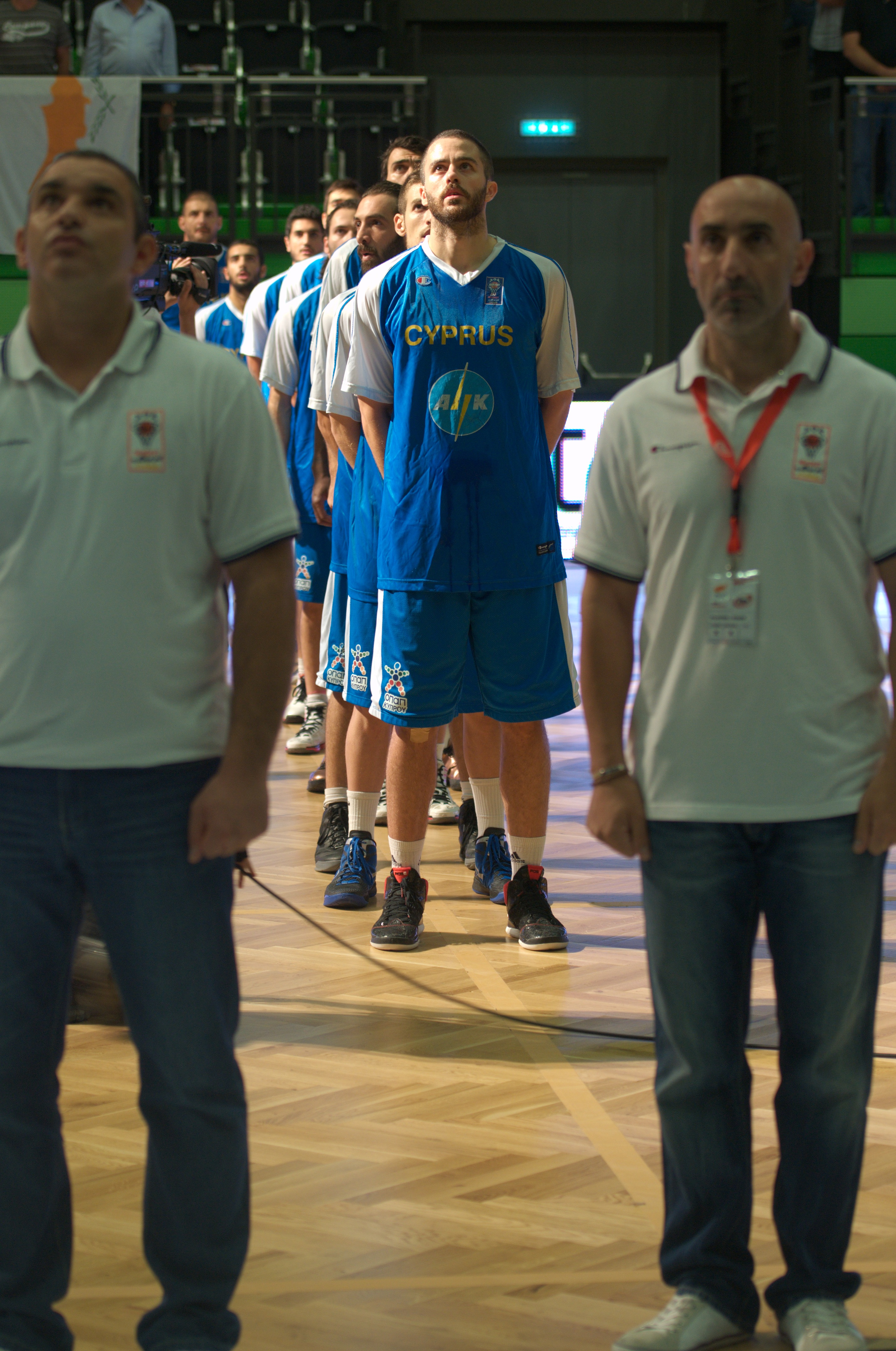 Zyprisches Team während der Hymne